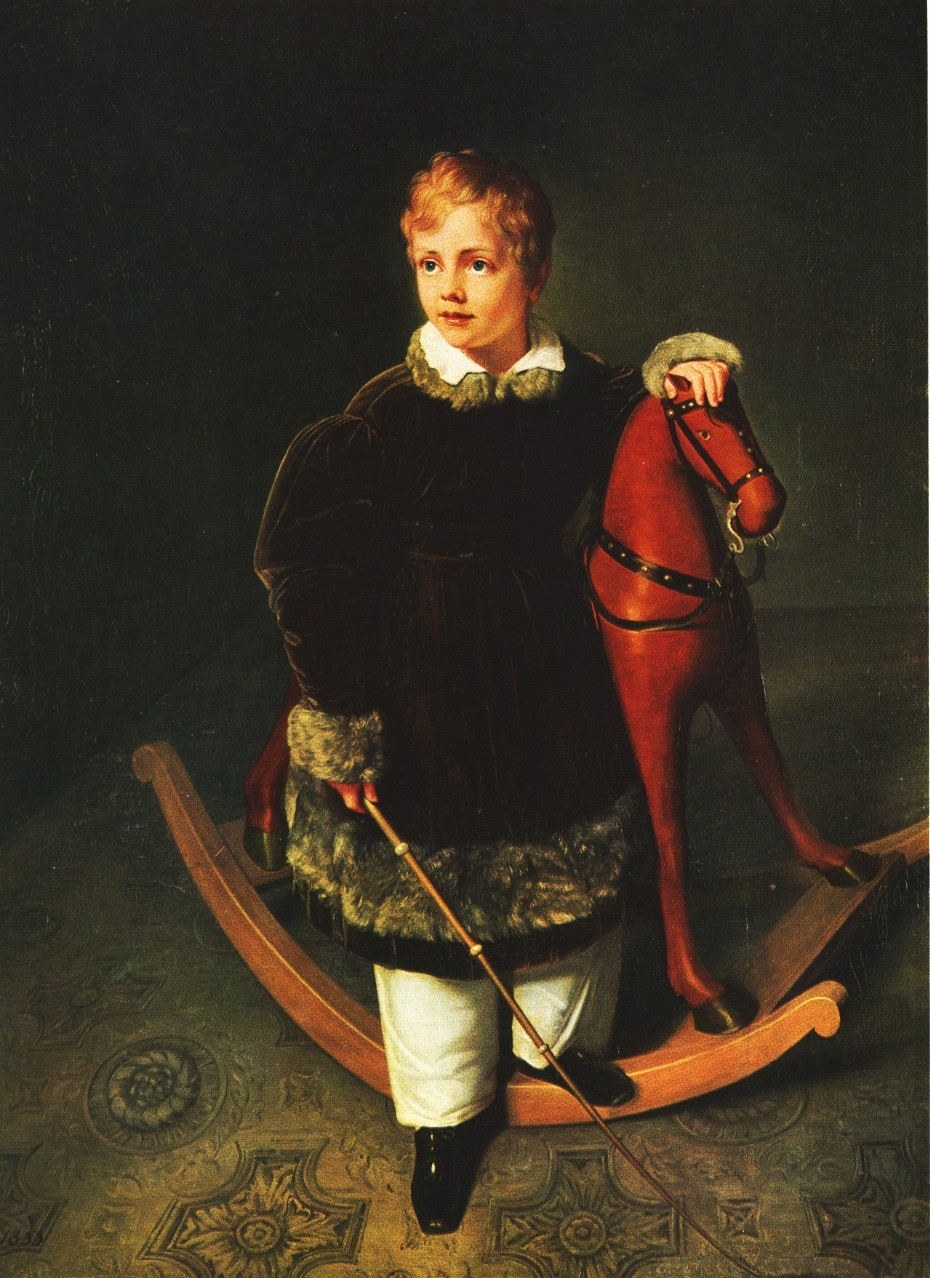 Knabenbildnis des Herzogs Albert von Sachsen mit Schaukelpferd